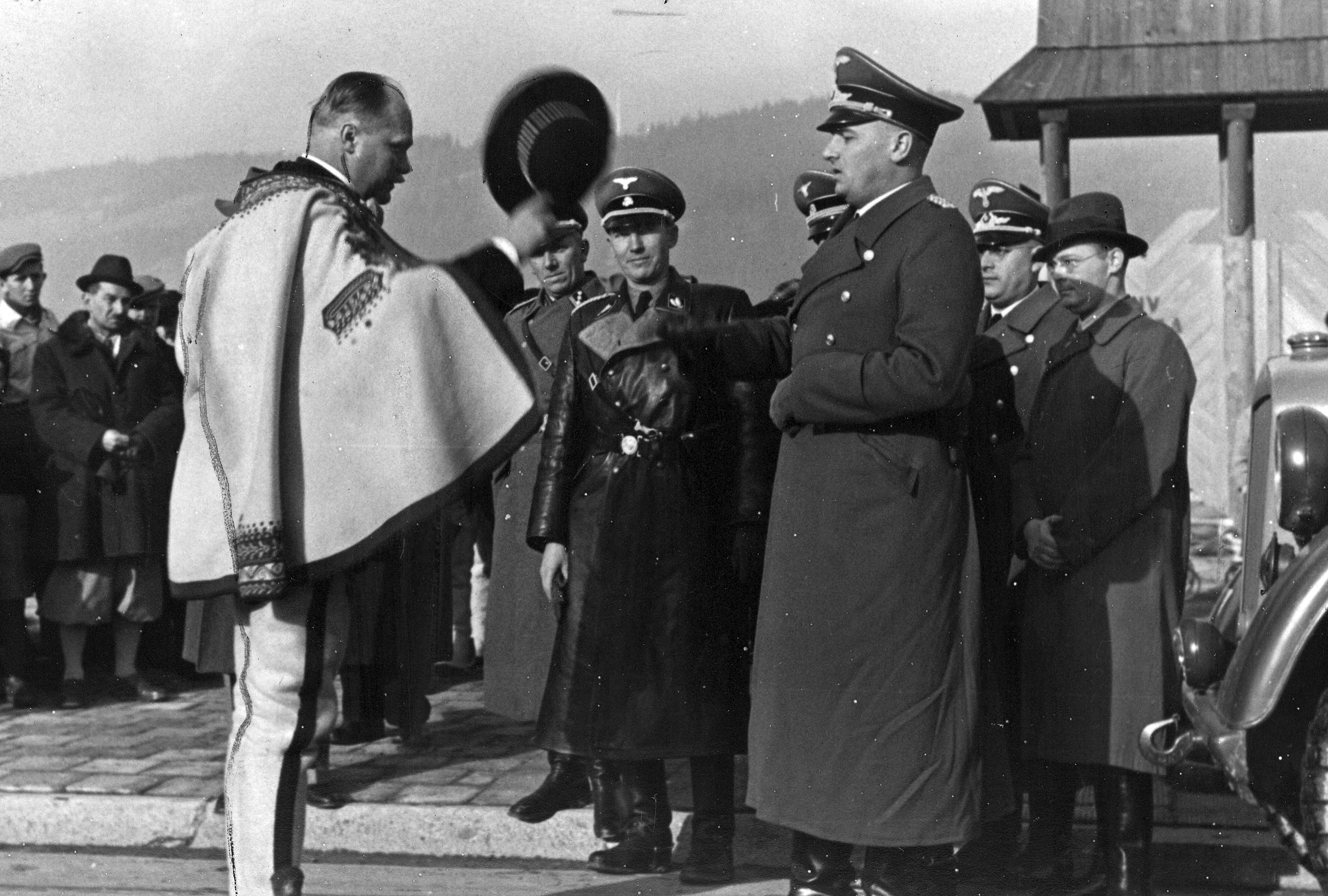 Zakopane. Przewodniczący Komitetu Góralskiego Wacław Krzeptowski (z lewej) wita gubernatora Hansa Franka po przybyciu do Zakopanego.